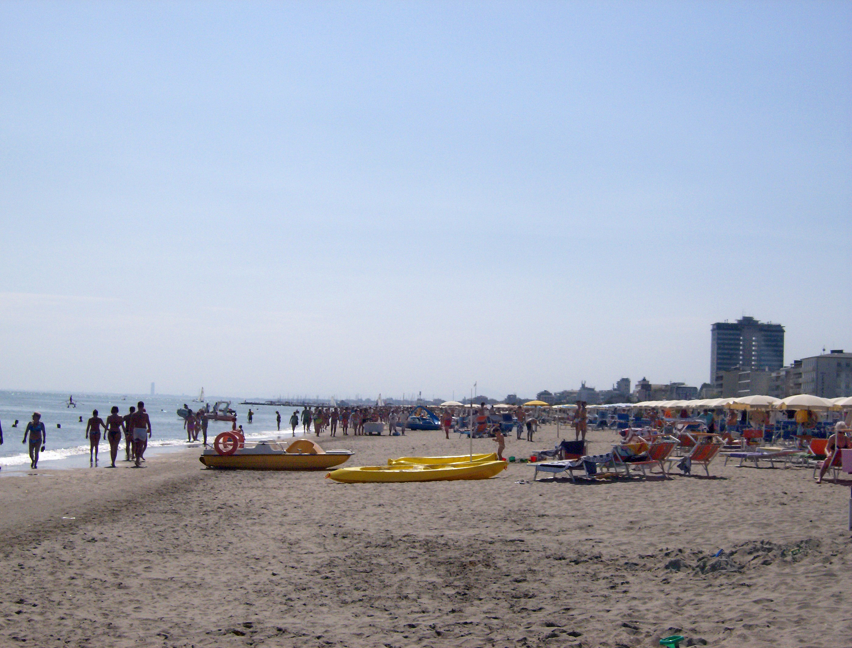 Spiaggia